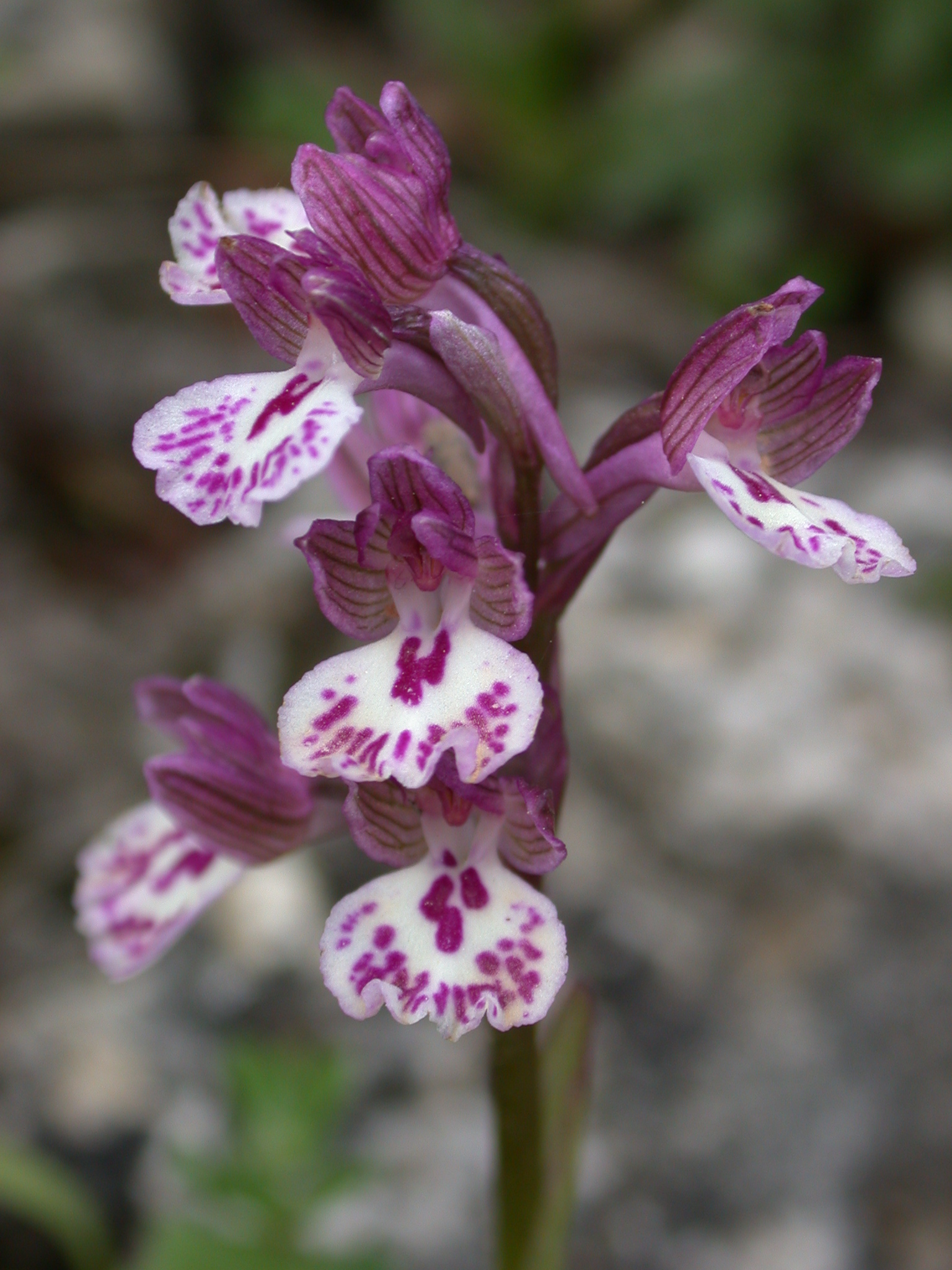 Anacamptis x feinbruniae (H.Baumann & Dafni) H.Kretzschmar, Eccarius & H.Dietr. (Anacamptis caspia x israelitica), Mount Meron, Upper Galilee, Israel, March 21, 2006. Other names: Orchis x feinbruniae H.Baumann & Dafni.